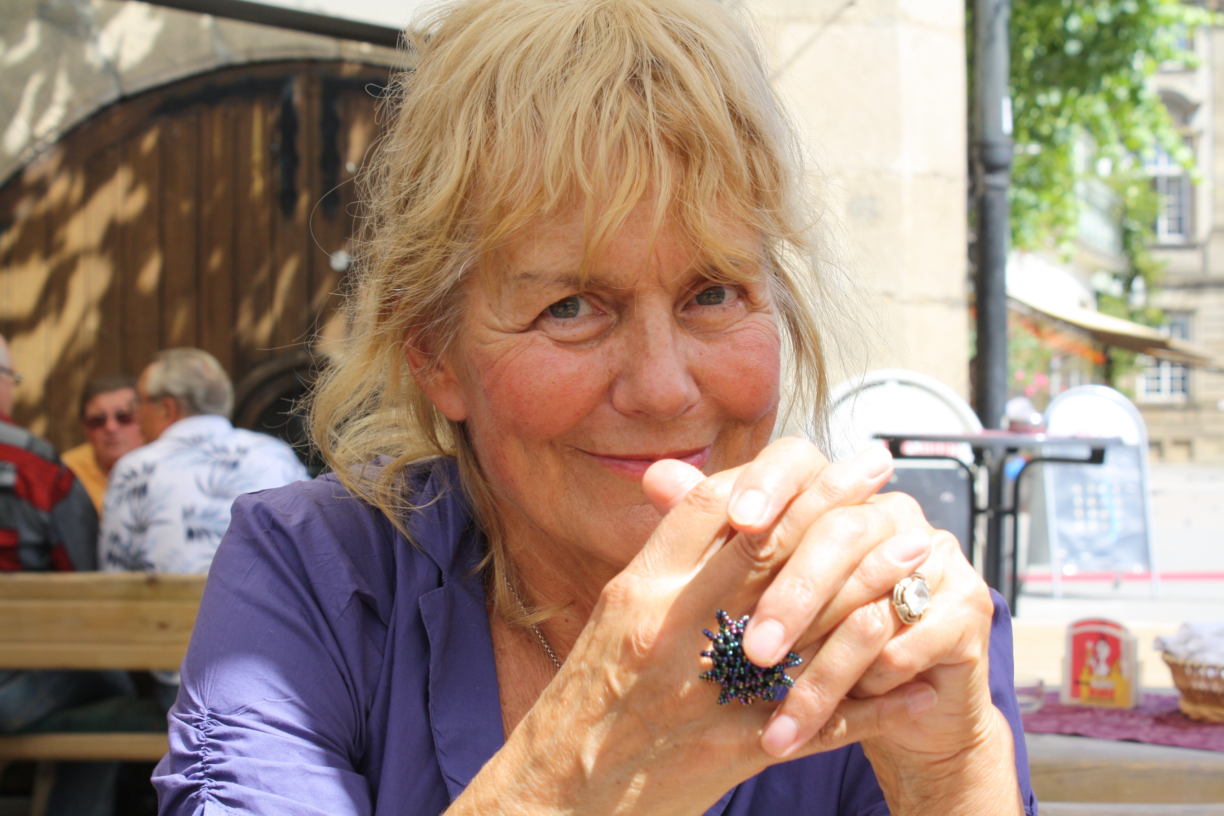 Foto von Hetty Krist